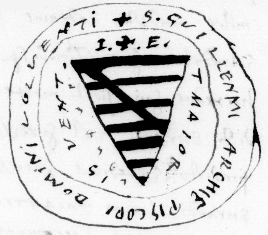 Sceau de Guillaume de Parthenay-l'Archevêque apposé en 1275 sur une des lettres de Geoffroy Chotard, sire de La Baubinière. Guillaume de Parthenay-l'Archevêque est alors seigneur de Parthenay et de Vouvant (Volventi visible sur le sceau).